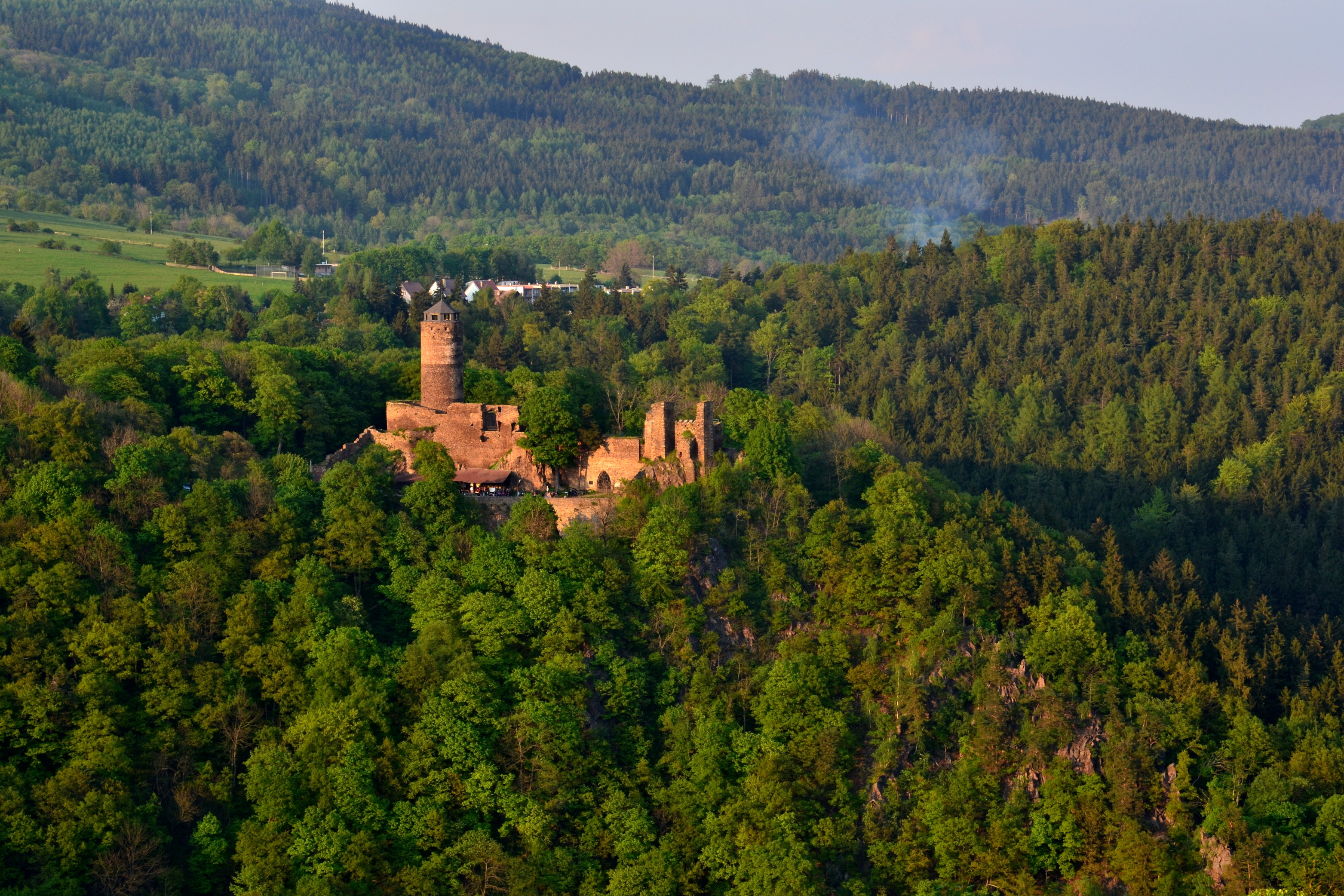 Hrad Hasištejn - pohled na hrad z PP Kokrháč